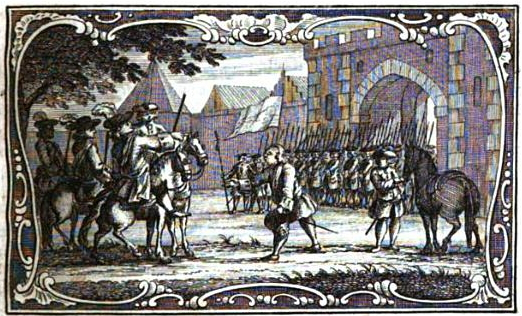 Siege of Gulik 1610